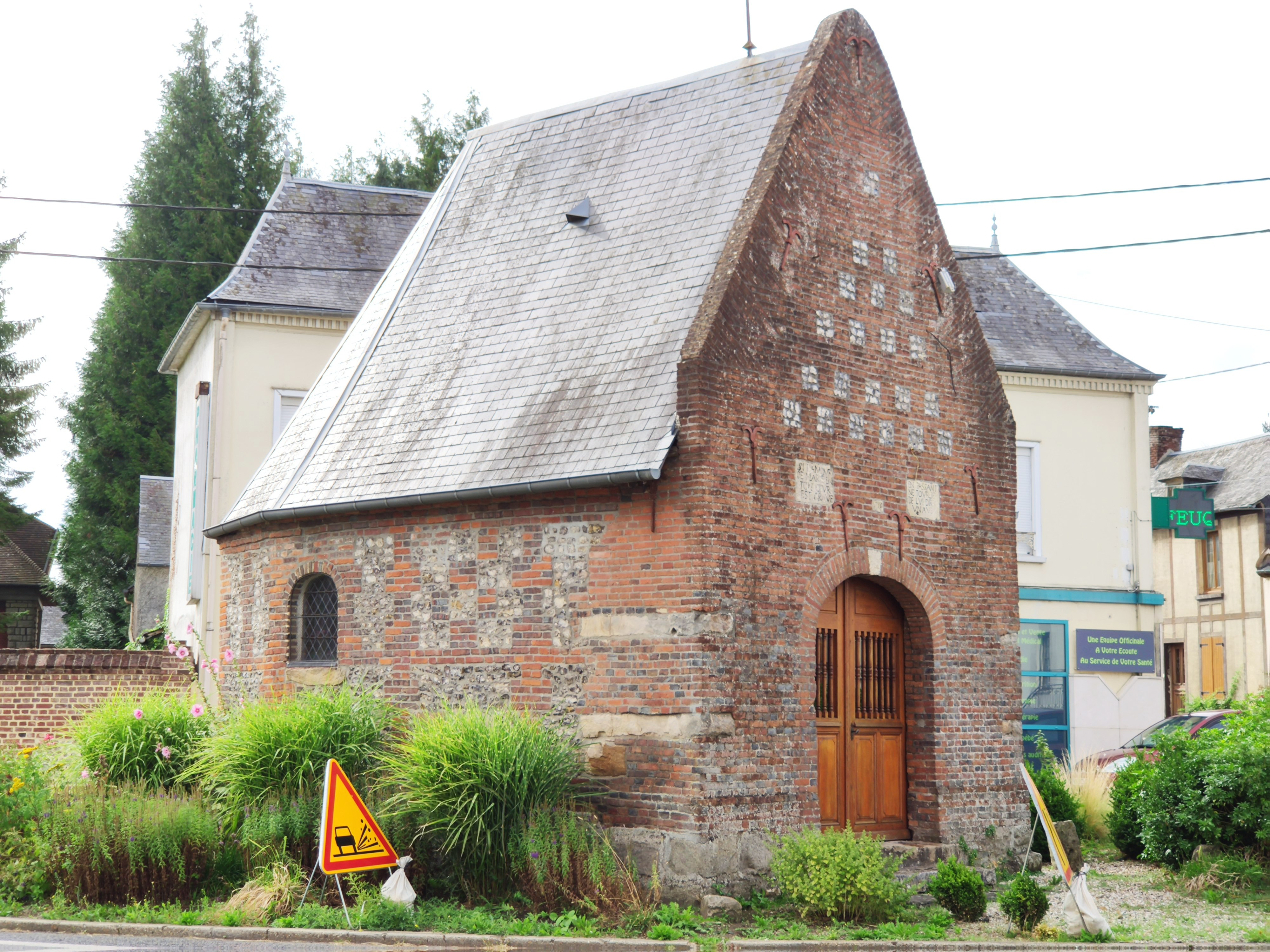 Feuquières : Chapelle Notre-Dame